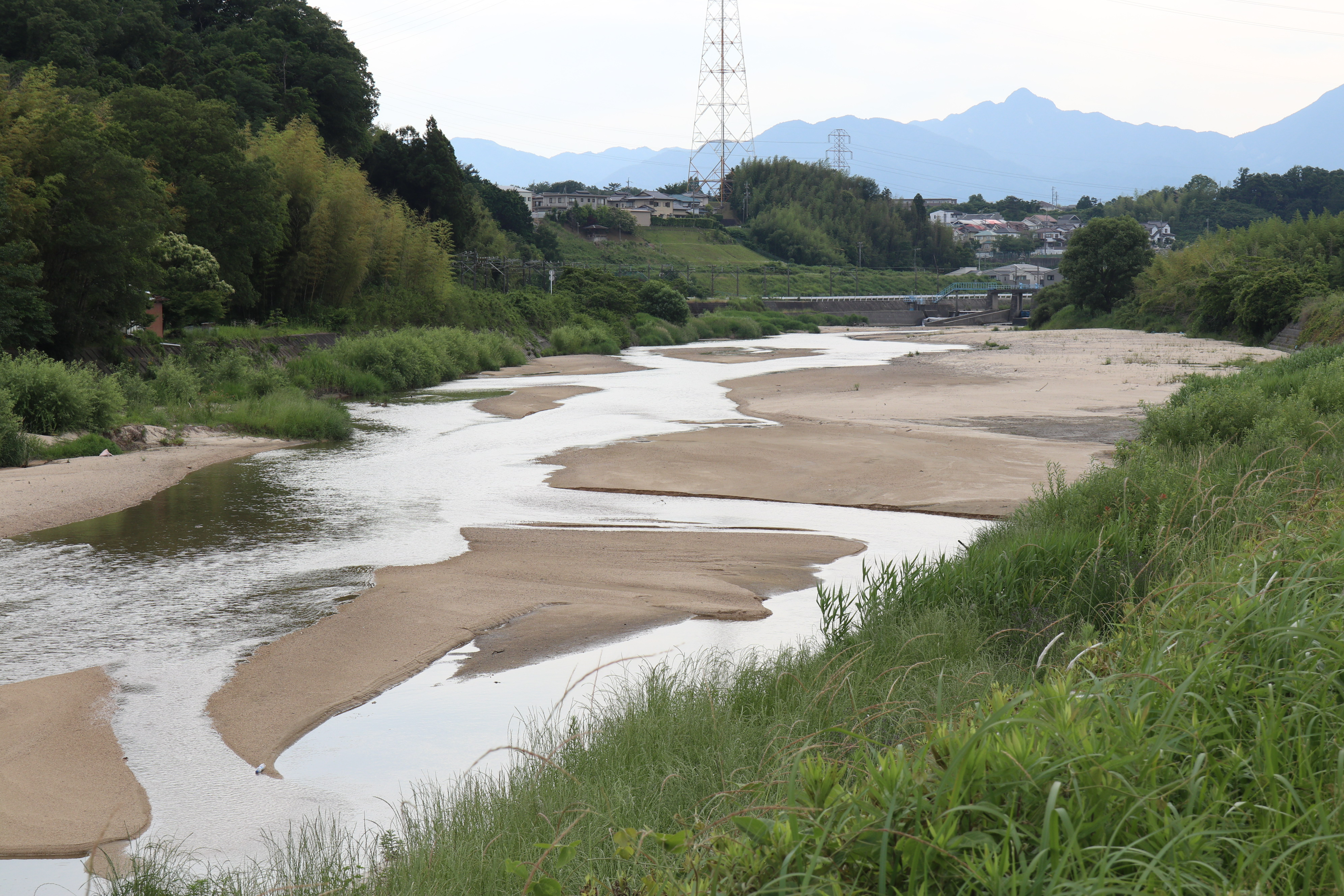 朝明川（左岸より撮影）, 三重県四日市市中村町